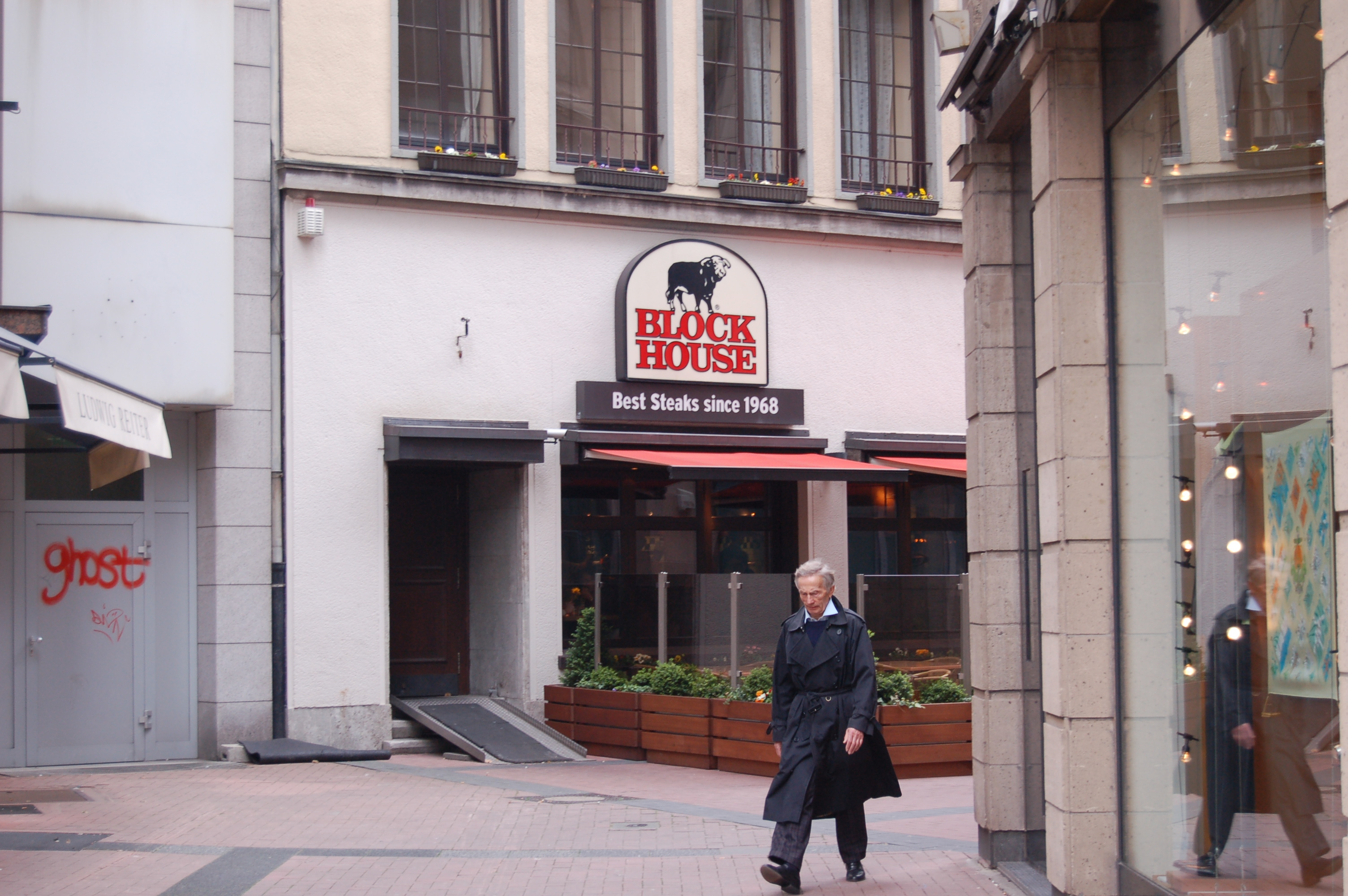 Restaurante Block House, em Düsseldorf, na Alemanha. Block House restaurante in Düsseldorf, Germany.